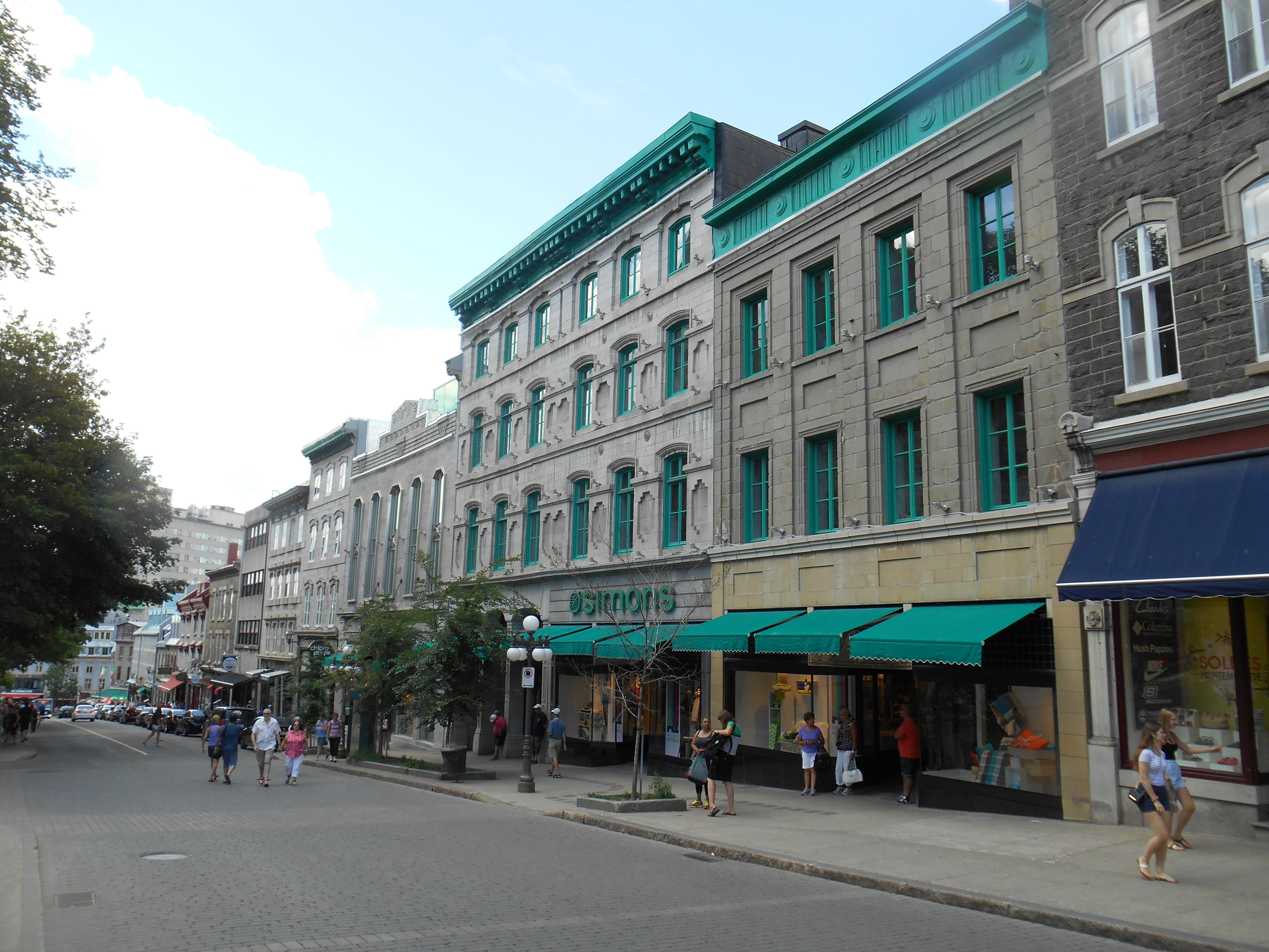 La Maison Simons, 20, côte de la Fabrique, Vieux-Québec